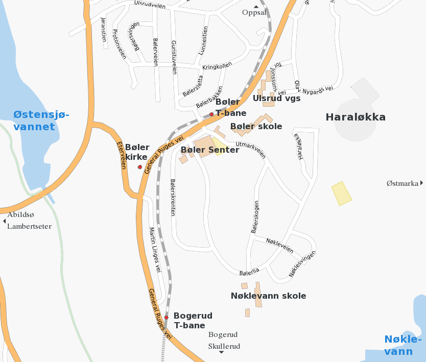 Kart over Bøler i Oslo